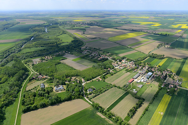 Rábasebes látképe madártávlatból